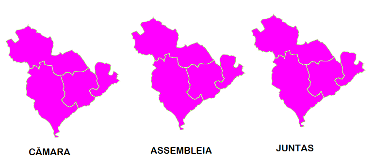 Mapa ilustrativo do partido mais votado por freguesia em Odivelas (2017)